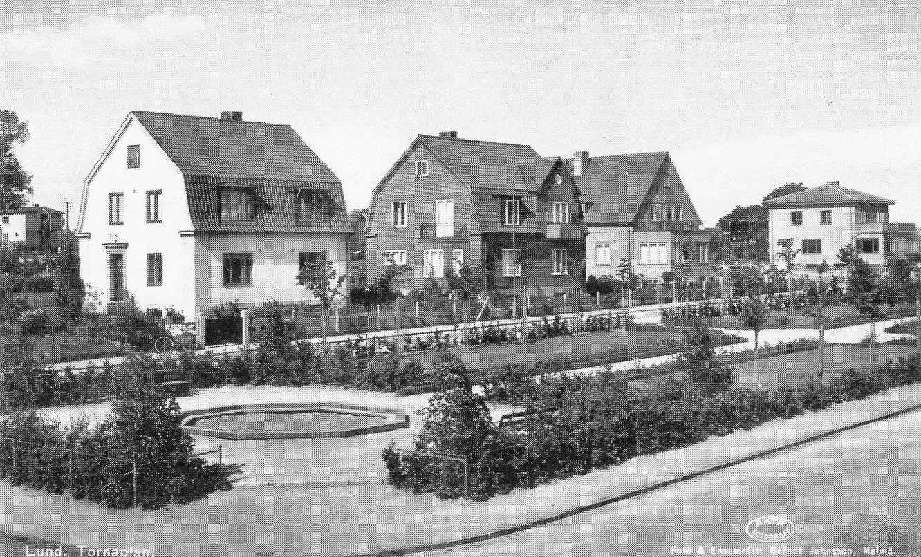 Tornaplatsen. Foto av Berndt Johnsson 1934. Johnsson avled 1943[1]